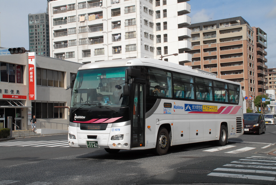 下関～北九州空港線 レトロ桟橋通にて撮影